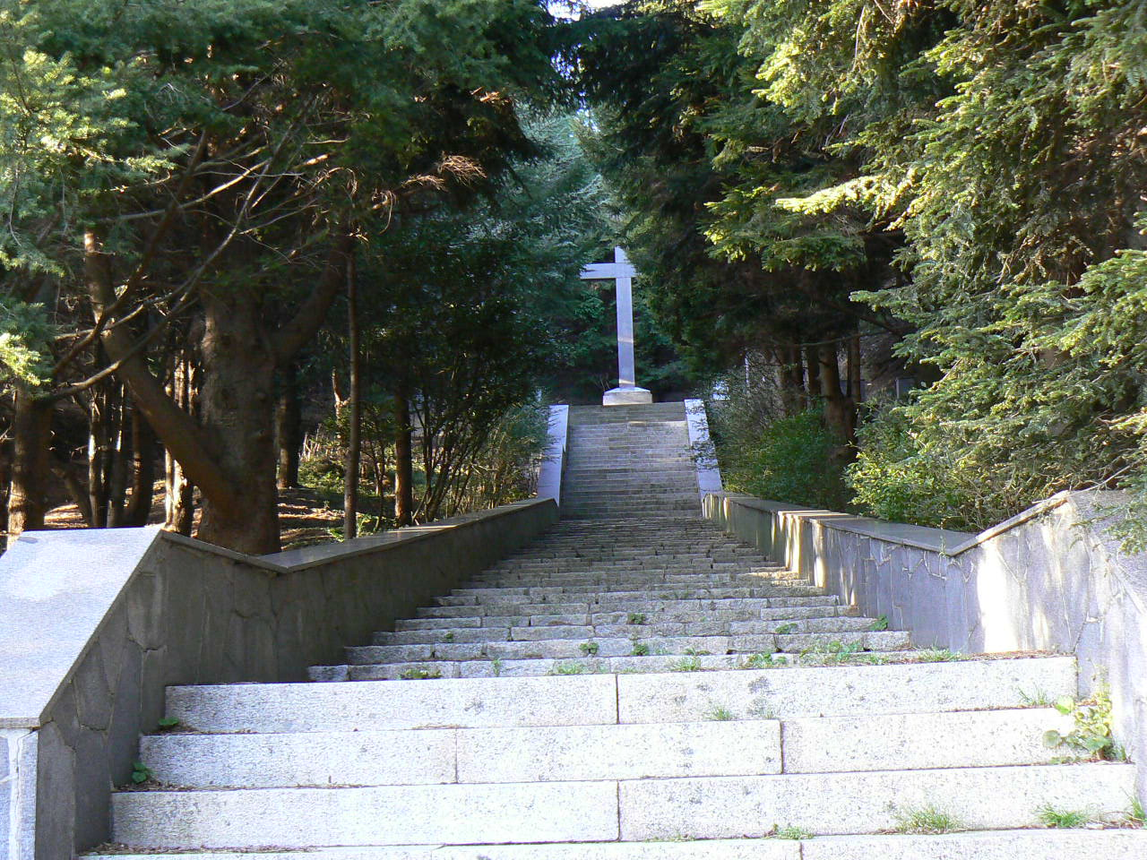 Sacrario dei Martiri del Turchino